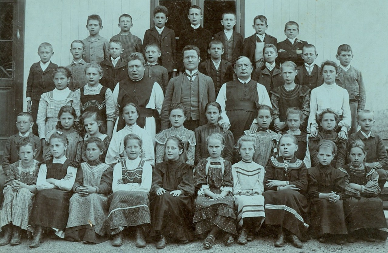 Schulklasse Heiligenkreuz um 1900